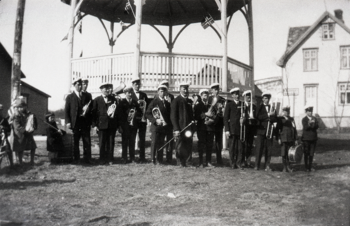 Sortland Musikkforening med dirigent J.D. Hammer foran musikkpaviljongen på Sortland